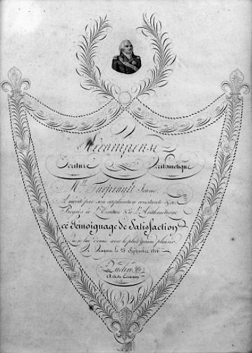 Témoignage de satisfaction manuscrit par Quelin, professeur à Angers vers 1816.